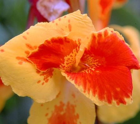 Canna ×generalis in São Nicolau island, Cape Verde